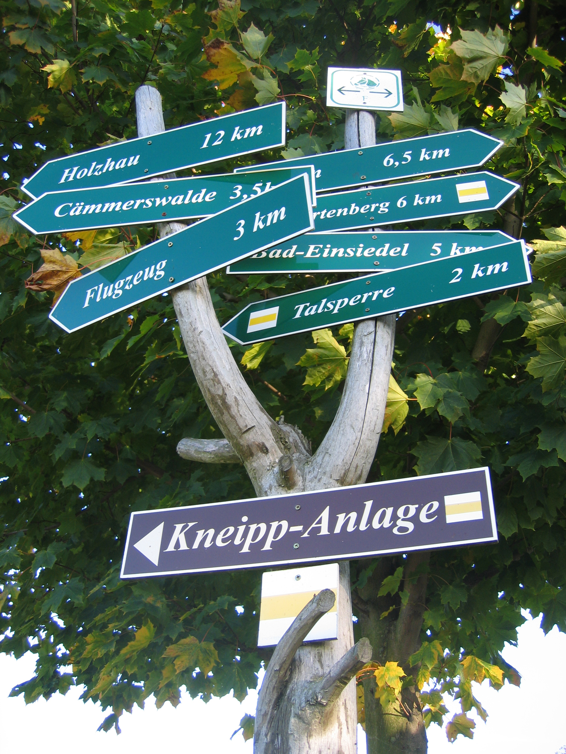 Cämmerswalde Wanderweg am Wildgehege Neuhausen/Ergebirge